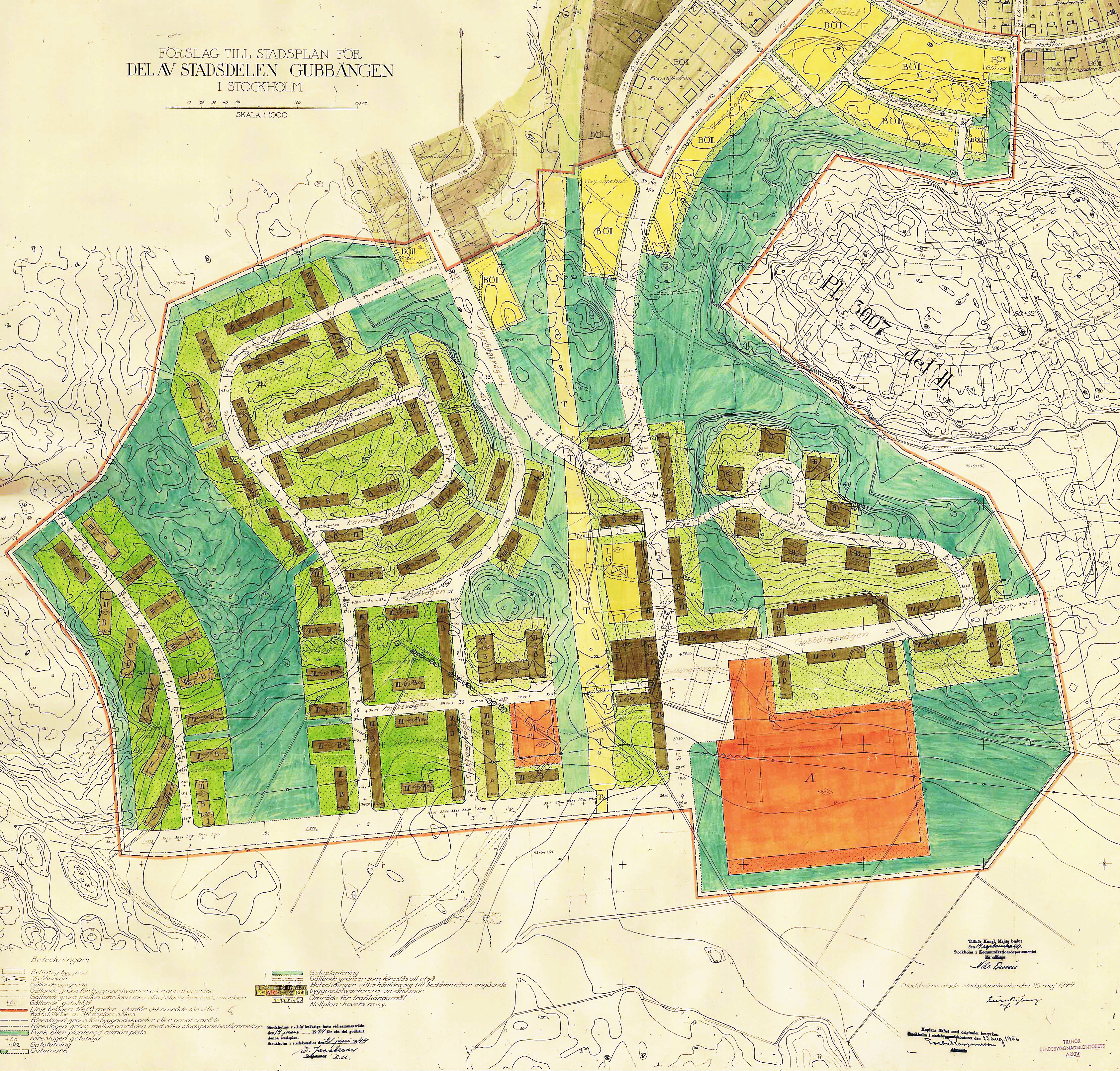 Stadsplan för Gubbängen (västra del)